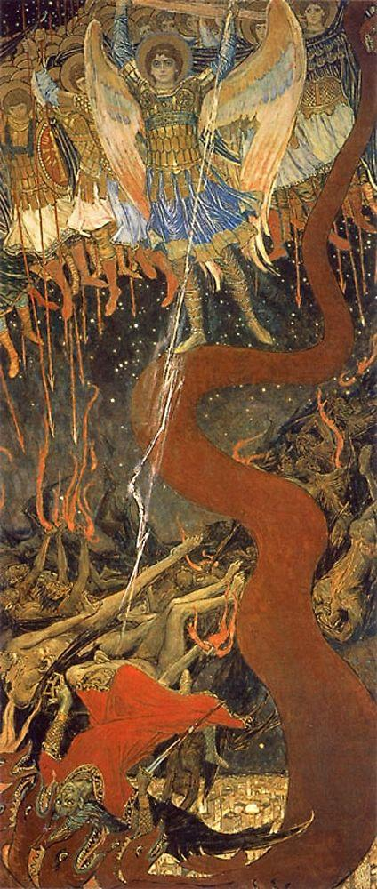 В. Васнецов, Архангел Михаил